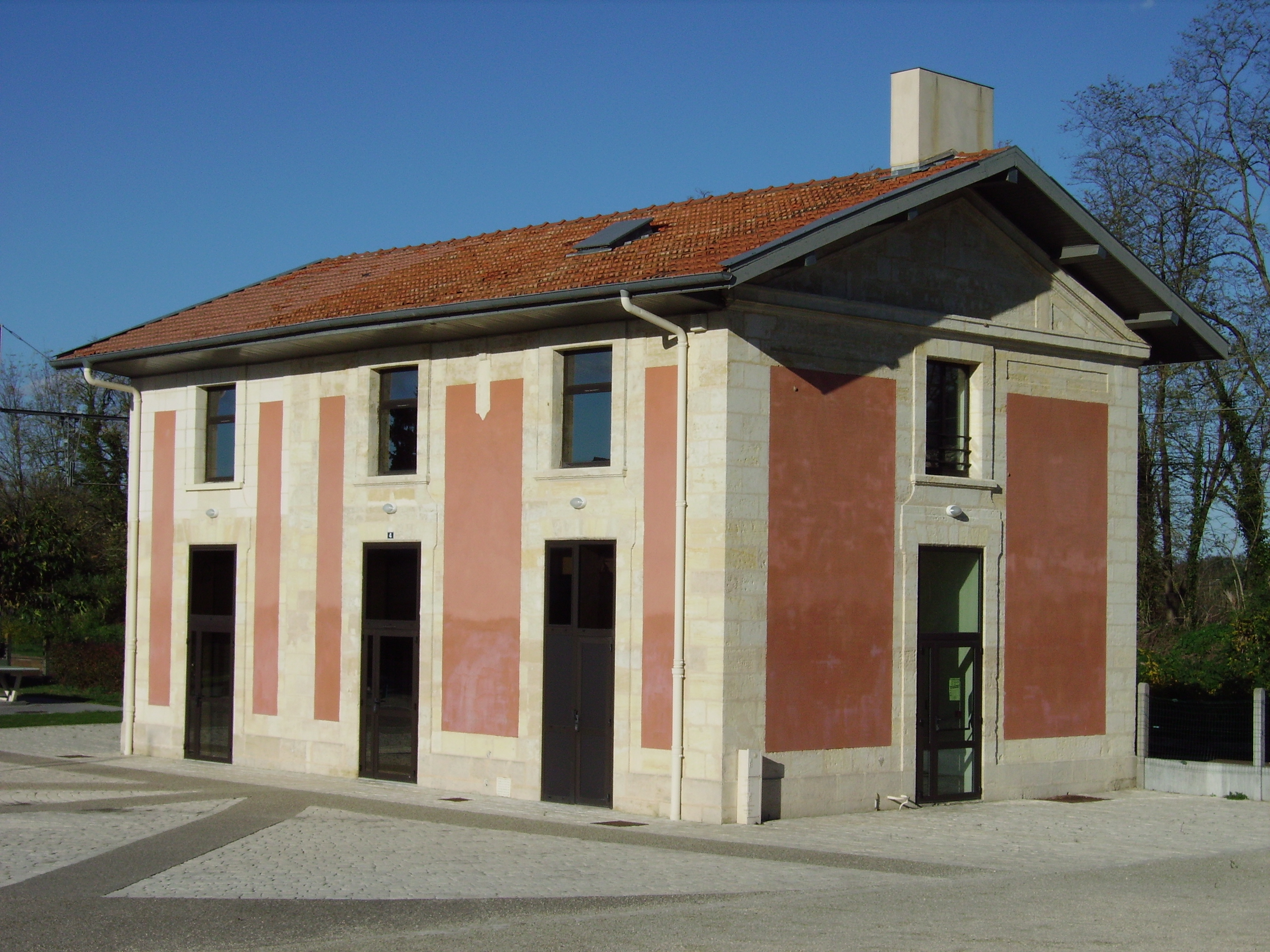 Ancienne garre Saint Médard d'Eyrans (Actuel Foyer Ados)